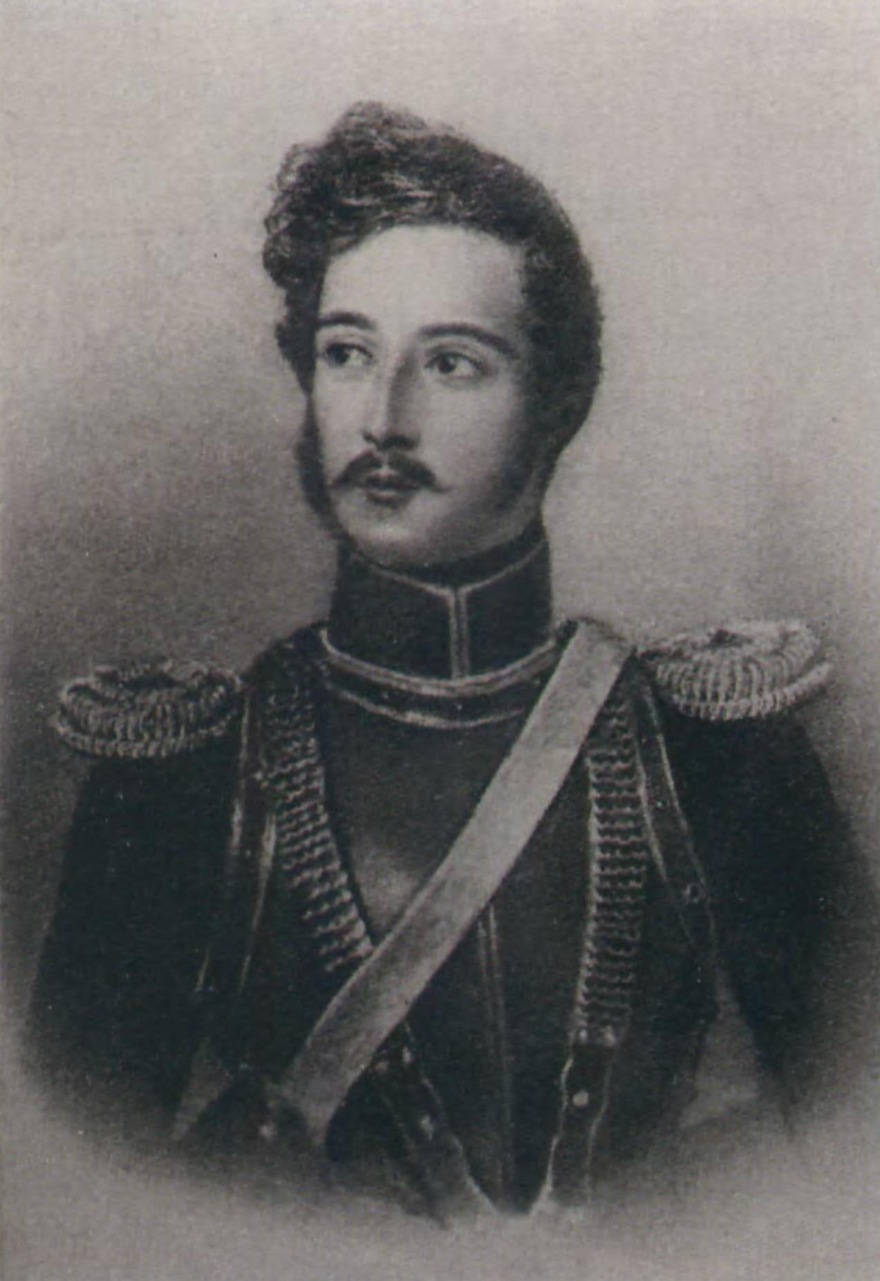 Михаил Викторович Кочубей (1816—1874), гофмаршал.